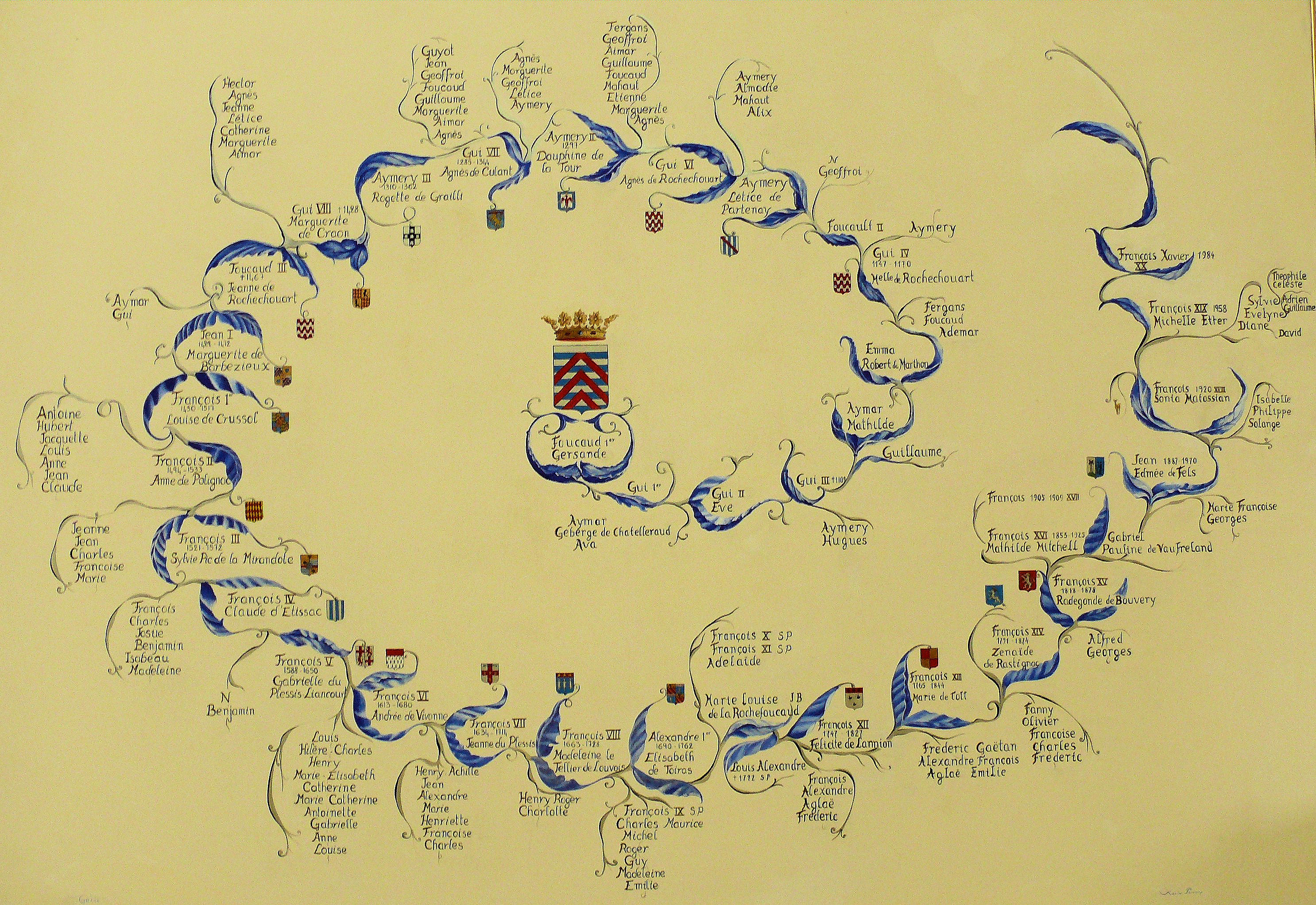 Château de La Rochefoucauld - Famille de La Rochefoucauld - Généalogie